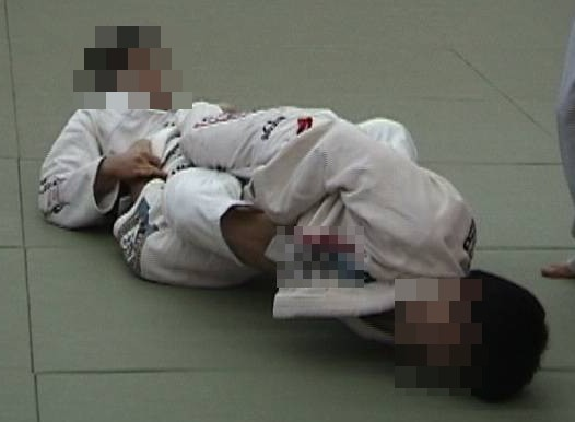 アキレス腱固め